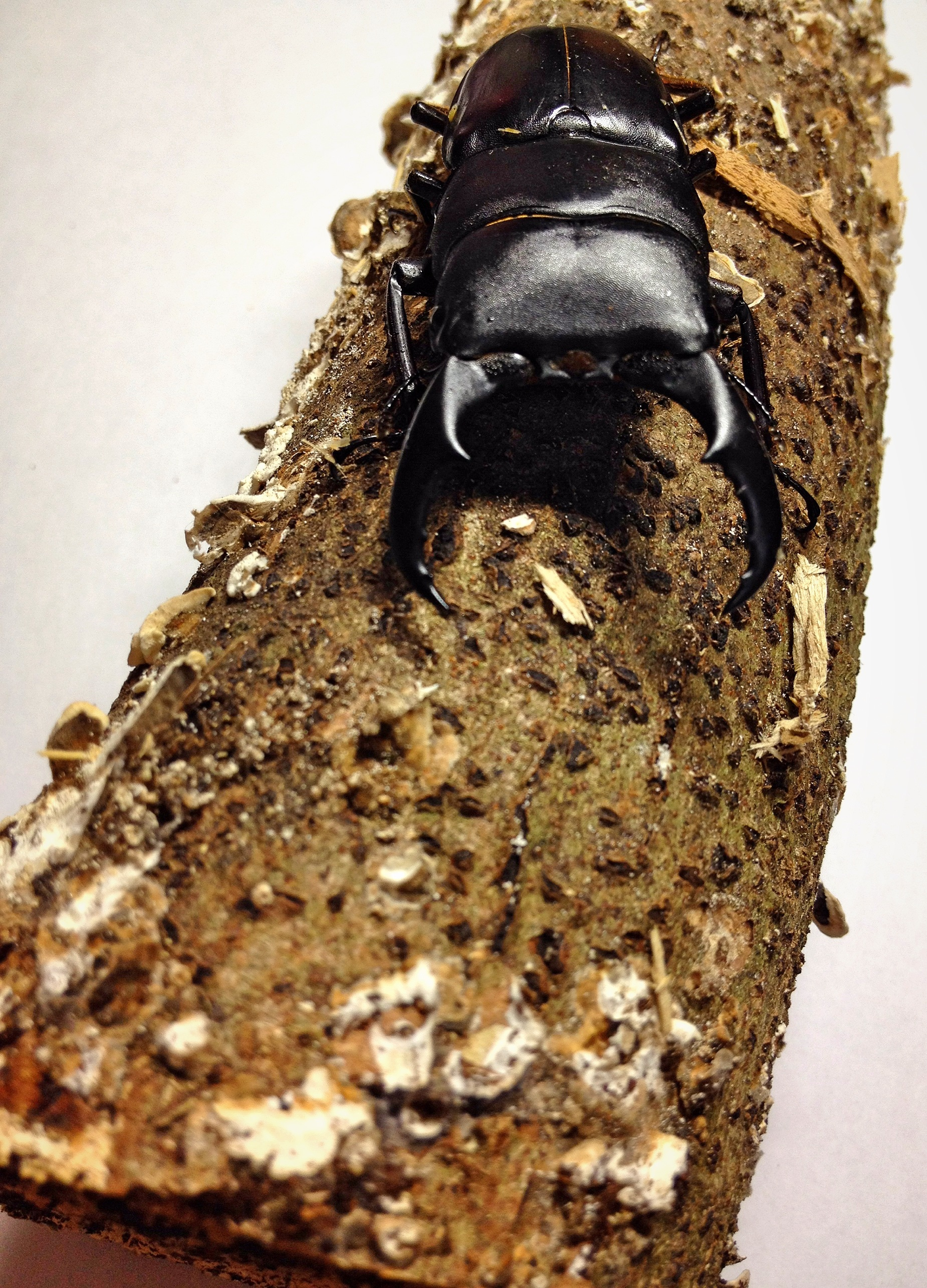 サキシマヒラタクワガタ